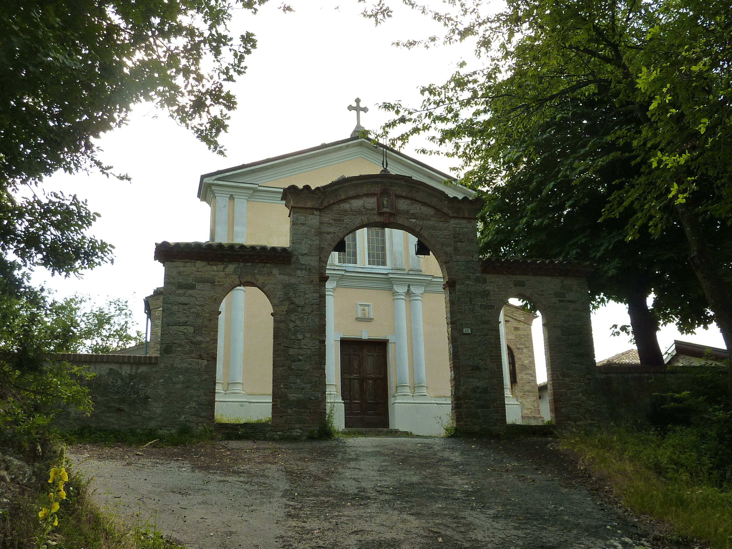 La Pieve di Castrignano (Langhirano - Parma)